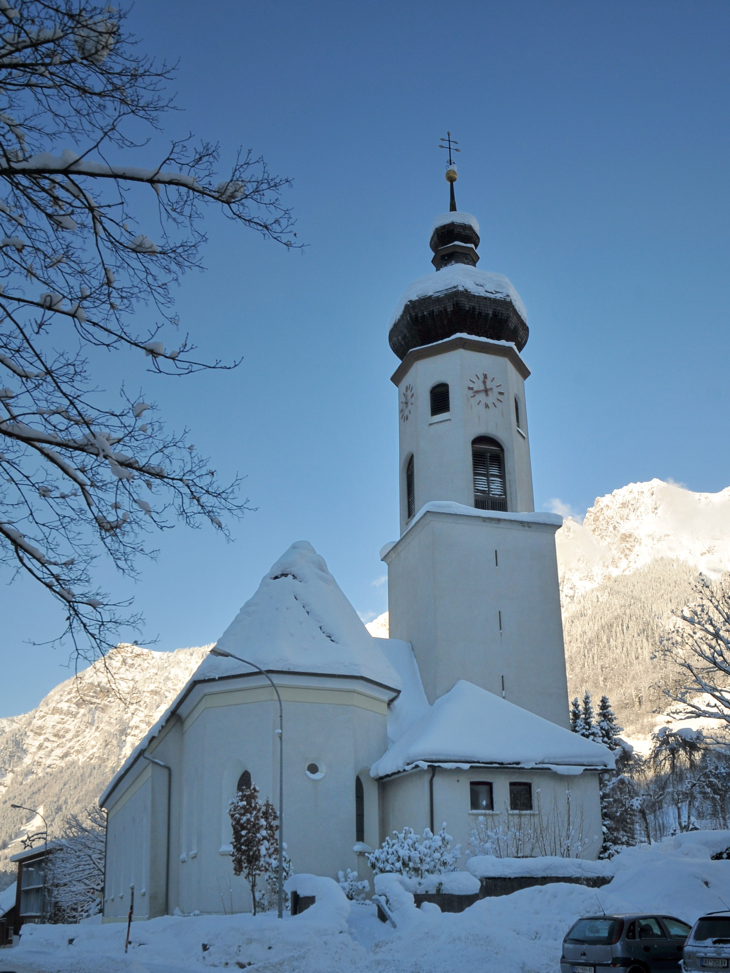 Kirche "hl. Nikolaus" in Innerbraz und das Gasthaus Rössle.